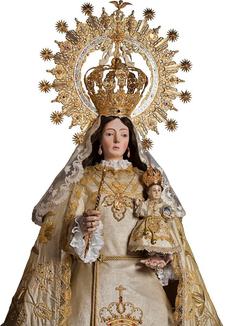 Nuestra Señora del Monte